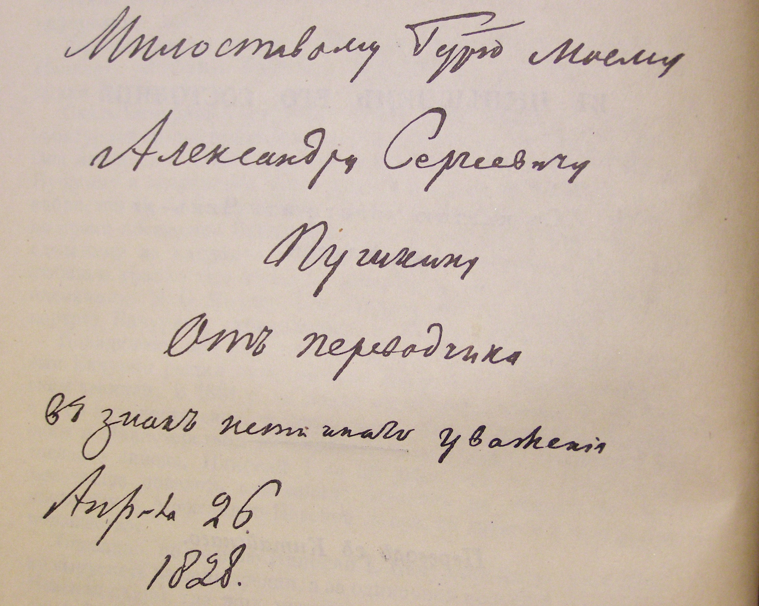 Посвящение А.С. Пушкину на обороте титульного листа "Описания Тибета" Н.Я. Бичурина. Автограф.